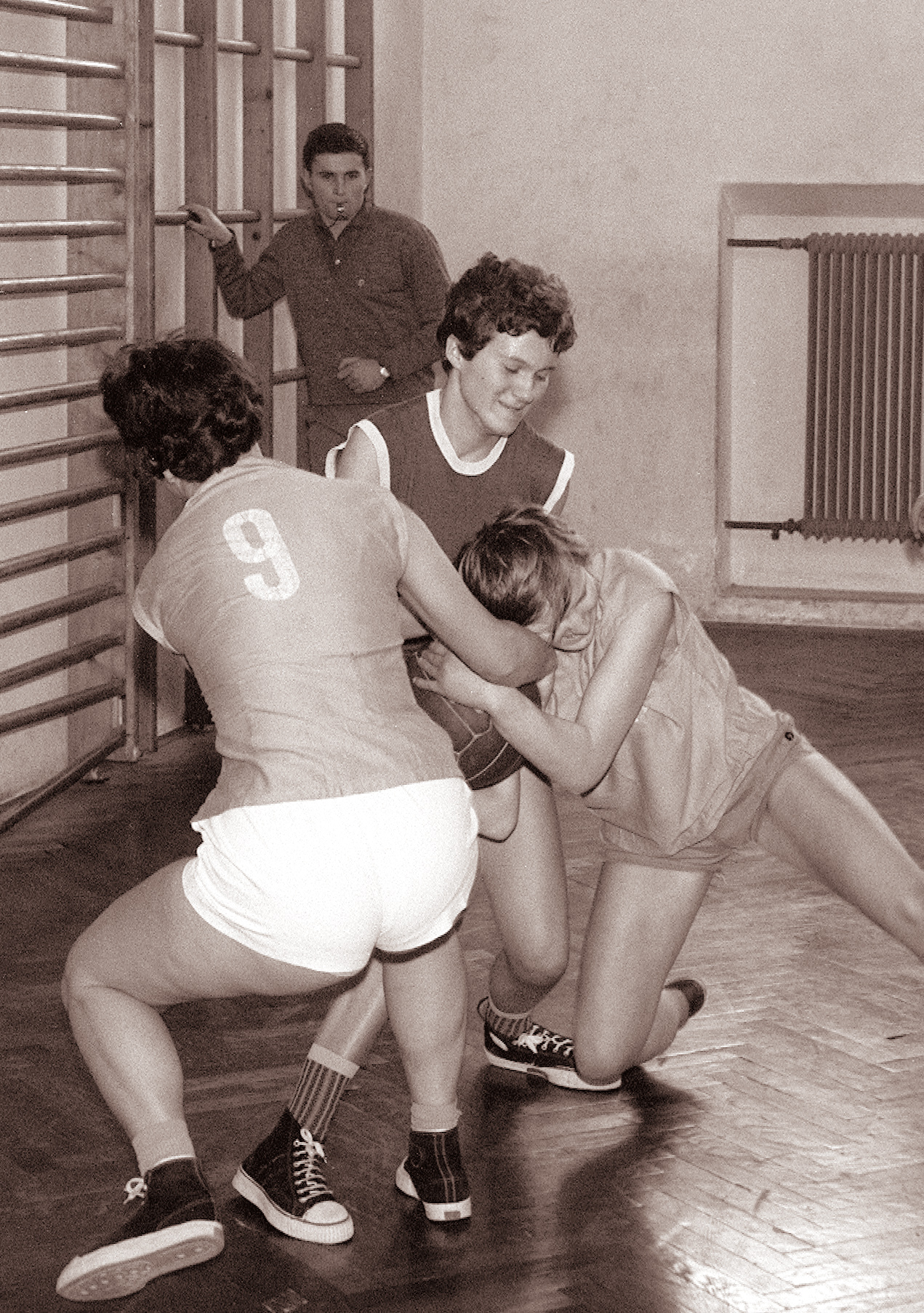 Ženska košarkarska tekma Maribor-Lokomotiva Zagreb. Na sliki: Turkova in Težakova v borbi z Boržičevo.